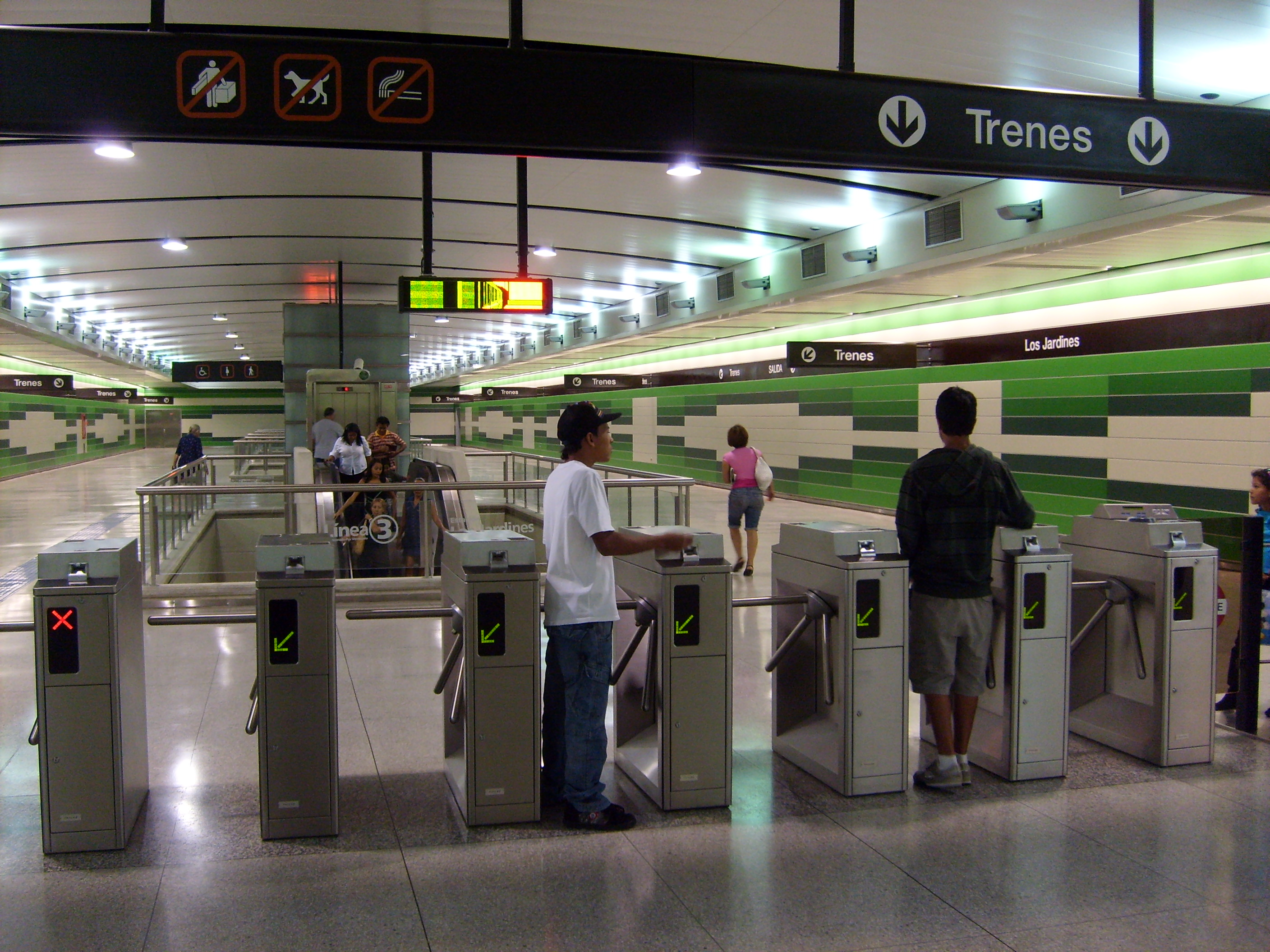 Estación Jardines de la linea tres del metro de Caracas, al dia siguiente de la apertura oficial.